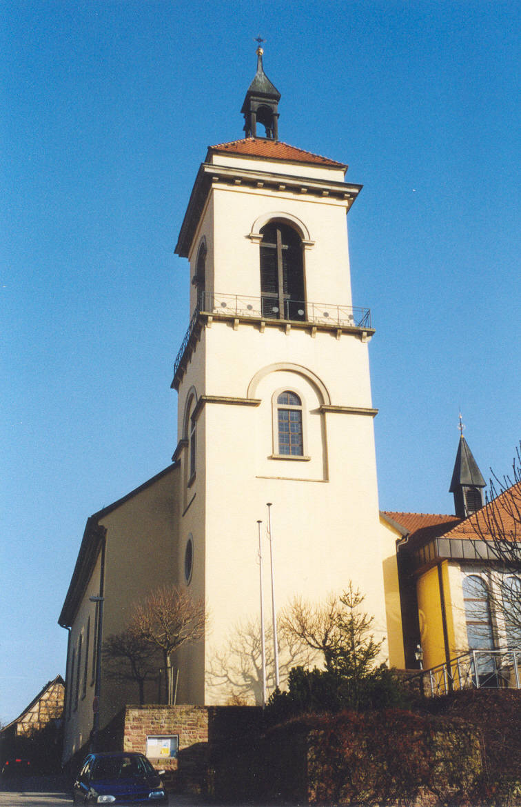 Die Obrigheimer Kirche im Weinbrenner-Stil. Sie wurde 1832 vom Neffen Friedrich Weinbrenners - Johann Ludwig Weinbrenner - errichtet und zeigt den für Baden typischen Klassizismus.